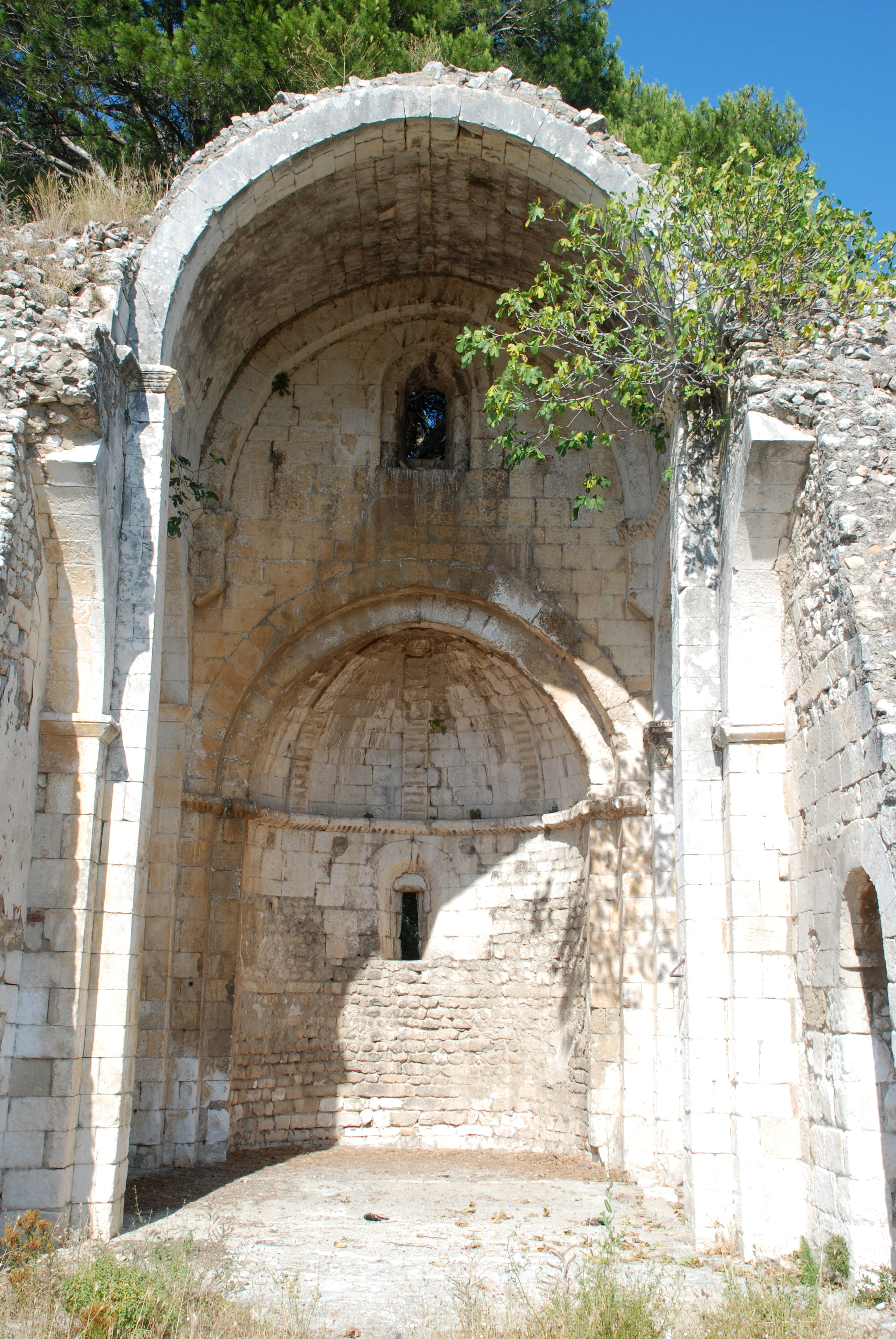 France - Provence - Chapelle Saint-Véran d'Orgon